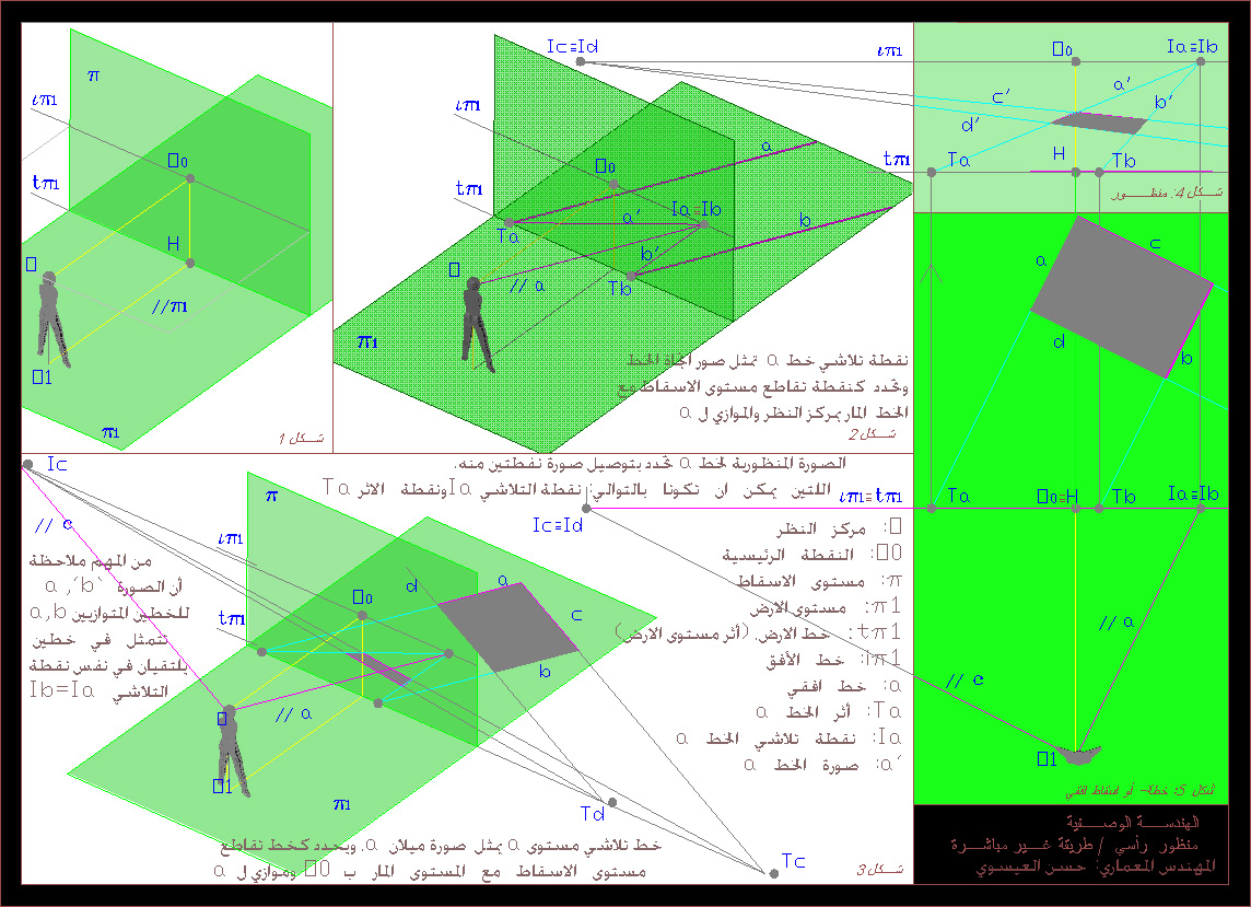 prospettiva a quadro verticale, elementi principali